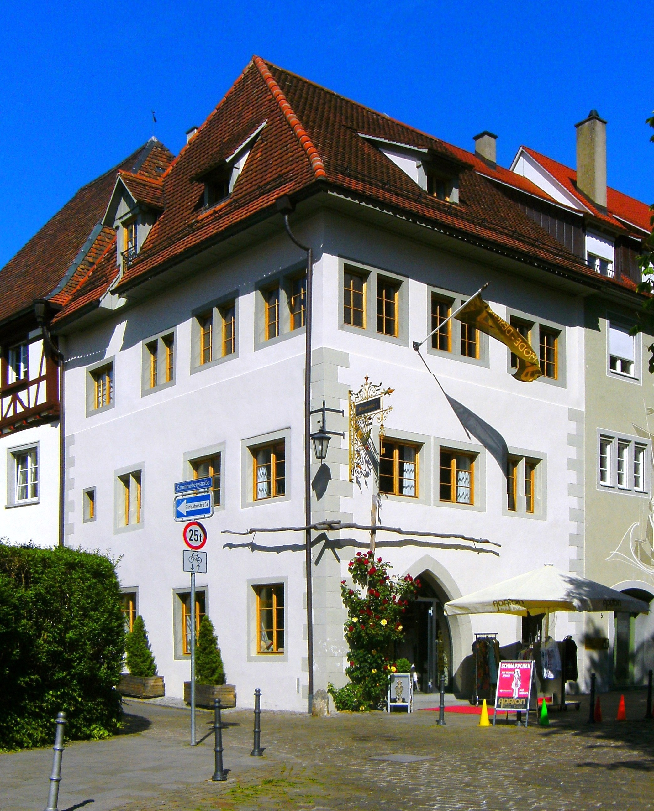 Münsterplatz 3 in Überlingen